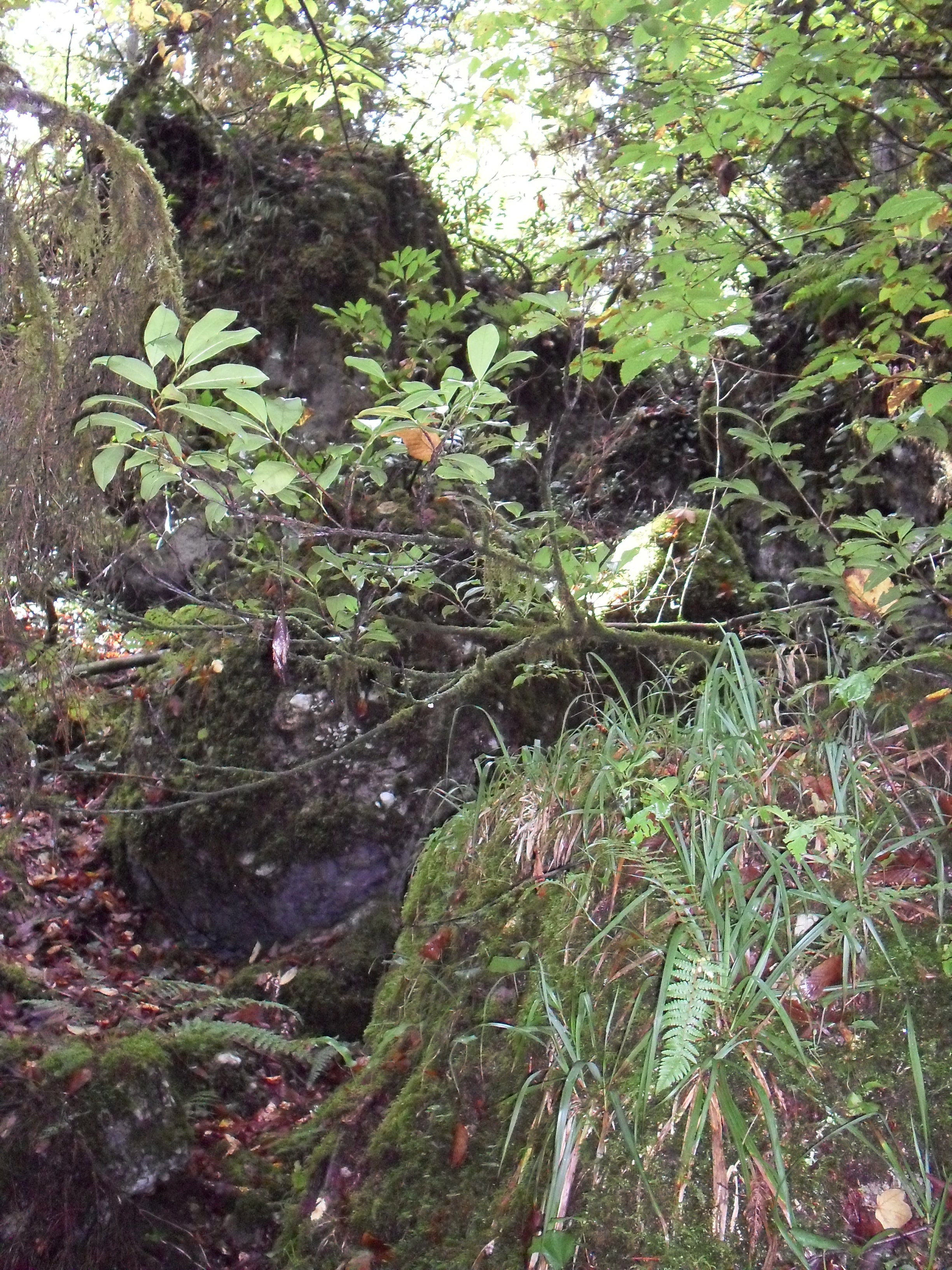 Абхазия.Карры на западном склоне котловины у оз.Рица